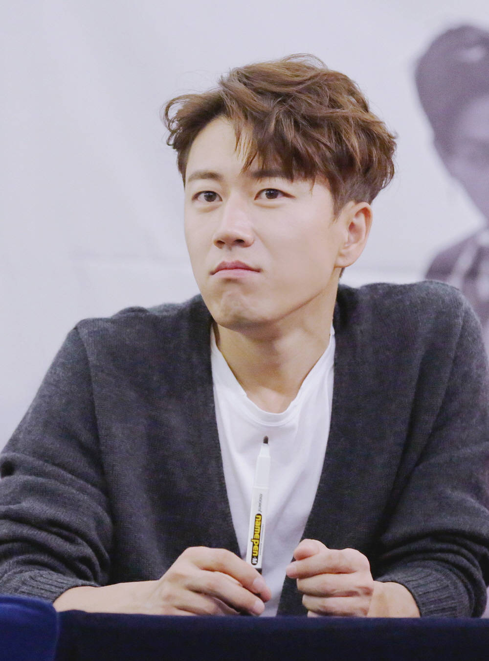 170504 젝스키스 팬사인회 은지원 이재진 김재덕 강성훈 장수원